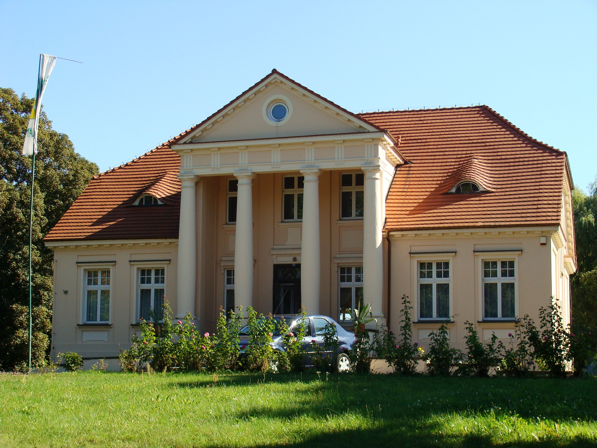 Sobiejuchy, dwór, 1910-1914